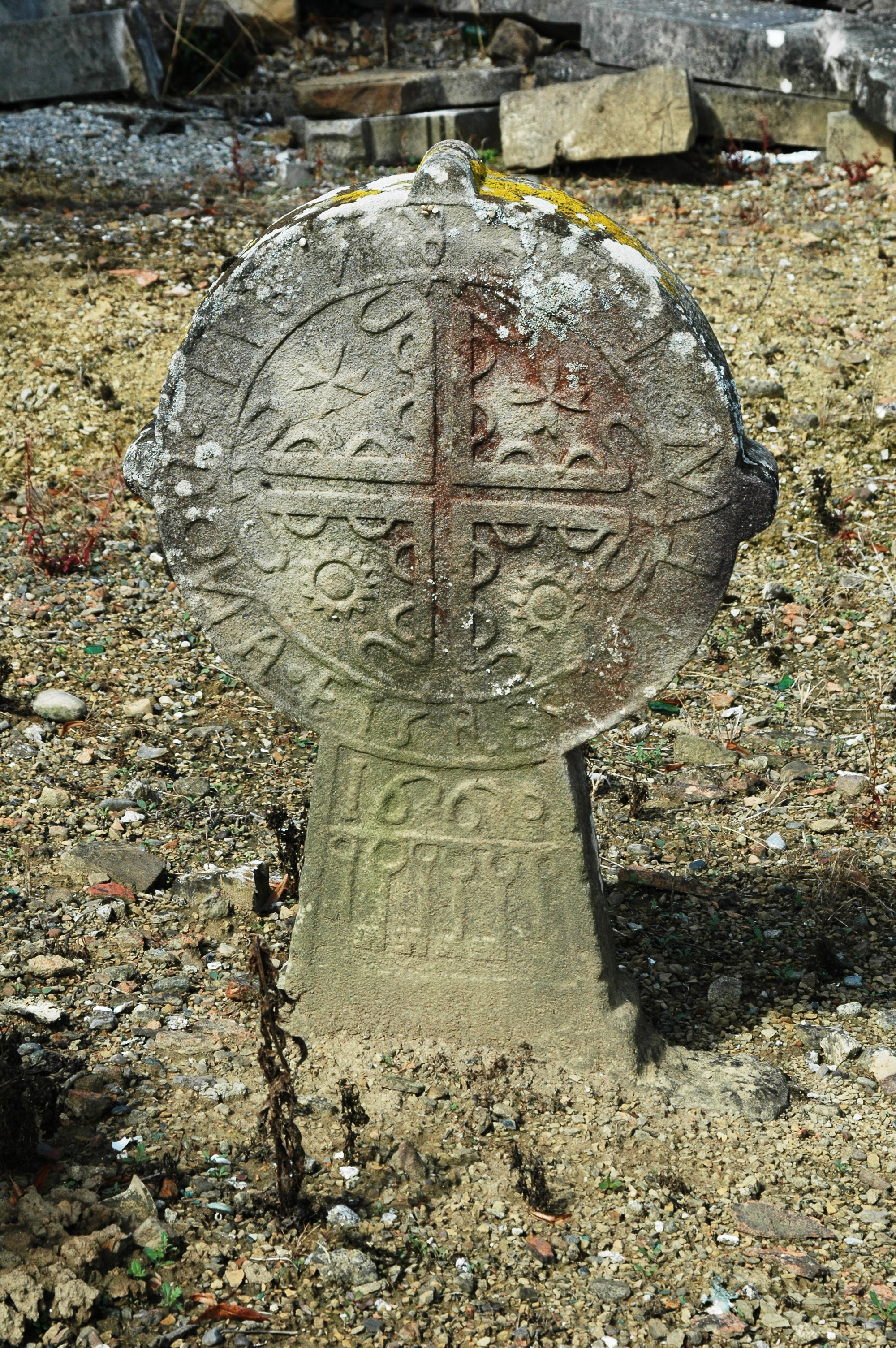 Masparraute, stèle basque de 1660